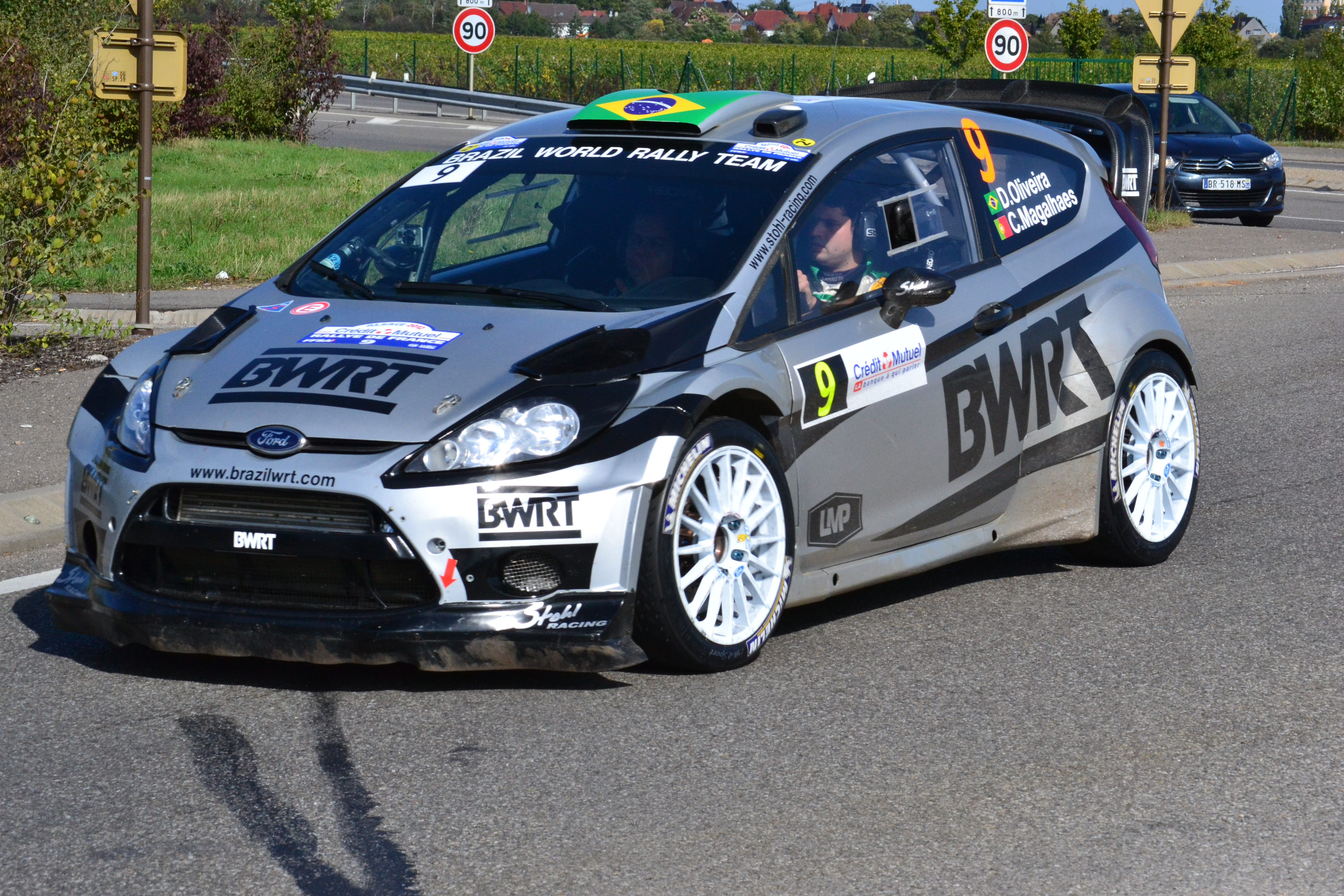 Daniel Oliveira sur la route de liaison entre le parc d'assistance de Colmar et l'ES5 Hohlandsbourg-Firstplan 2 durant le Rallye de France-Alsace 2012.